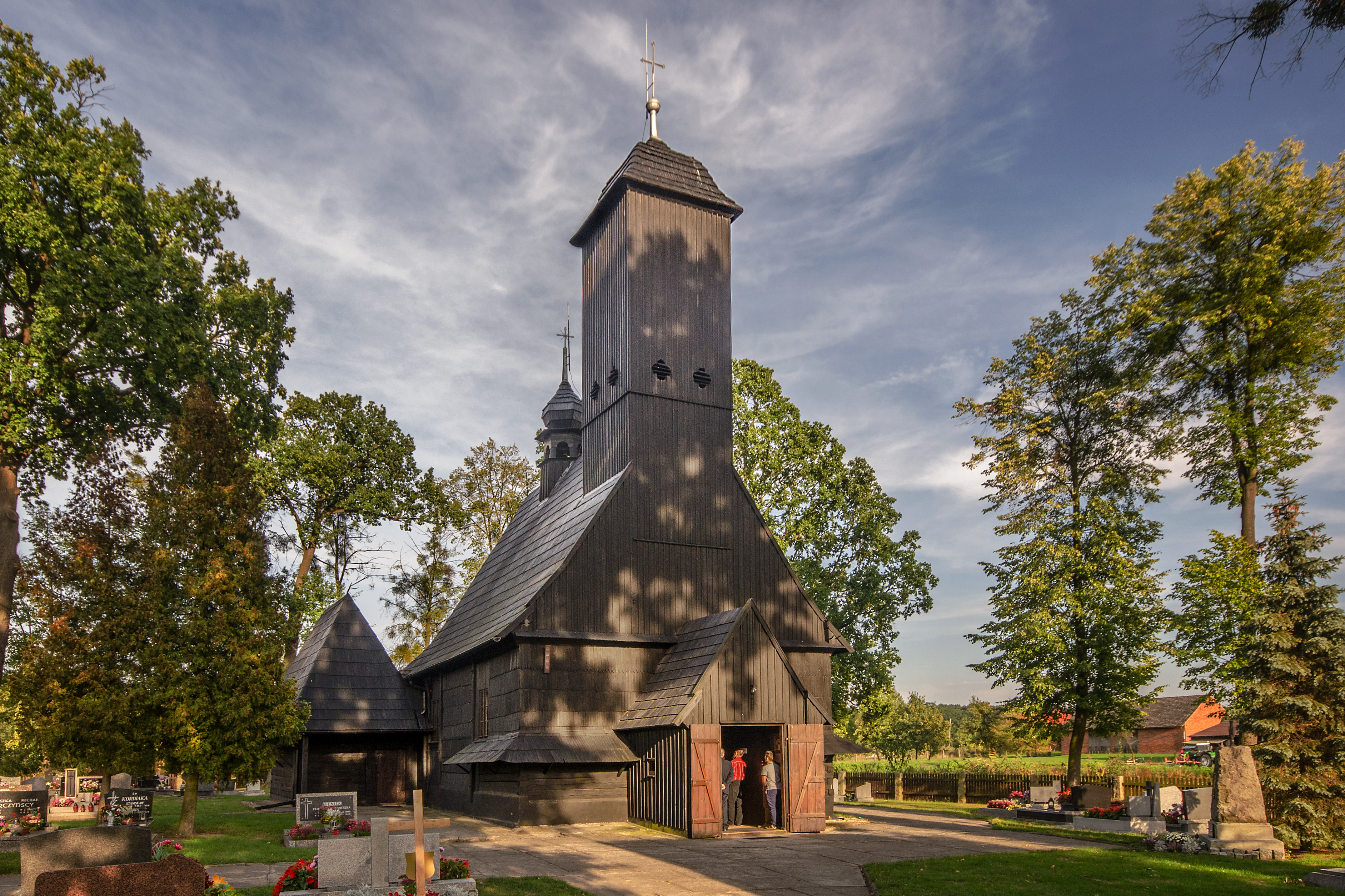 Wędrynia, kościół fil. p.w. św. Jana Chrzciciela, 1791